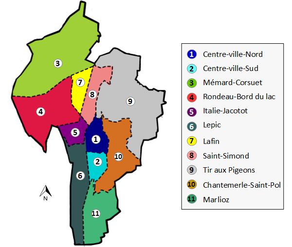 Carte des quartiers administratifs d'Aix-les-Bains.